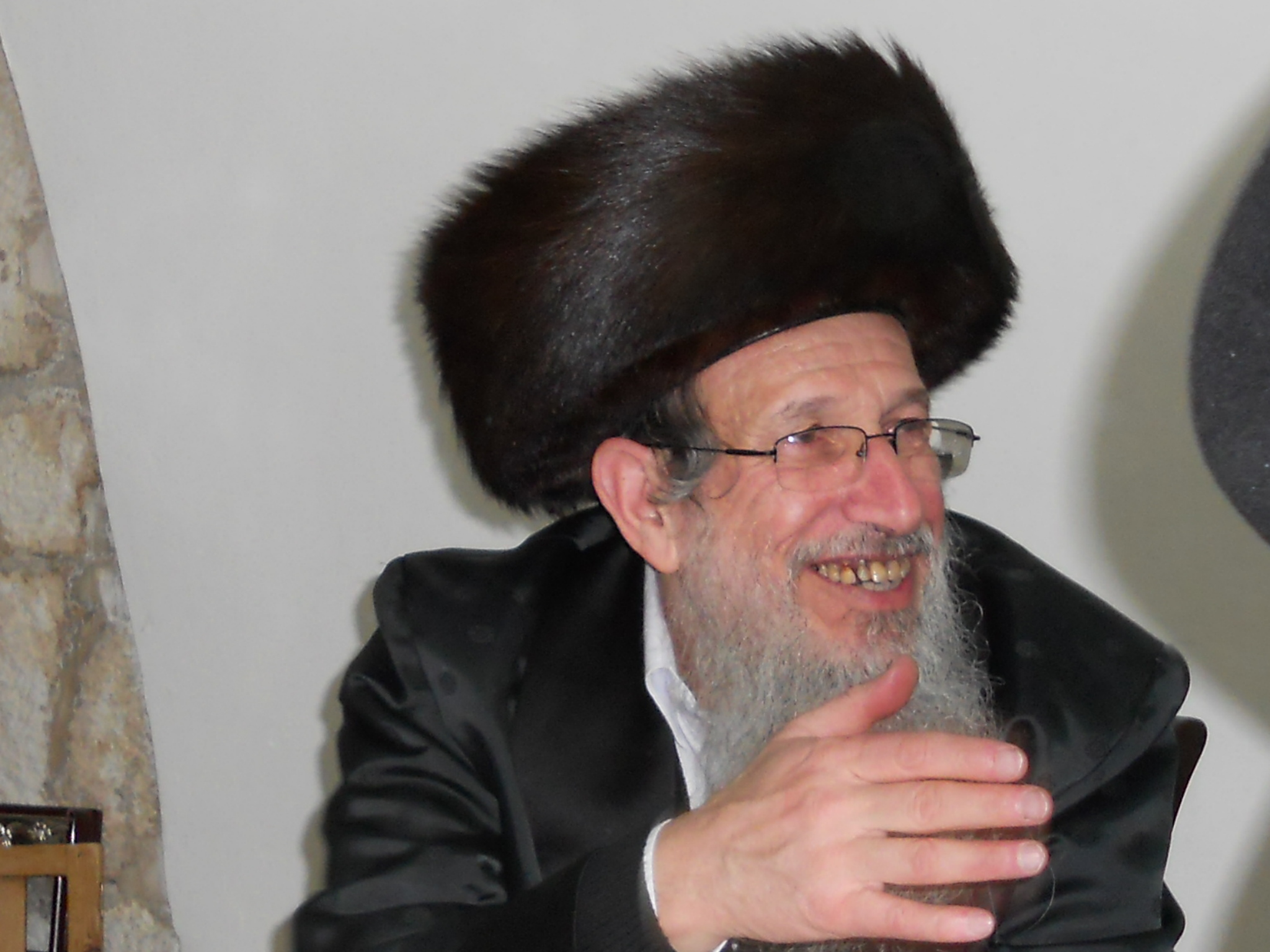 הרב יום טוב זילברמן מירושלים